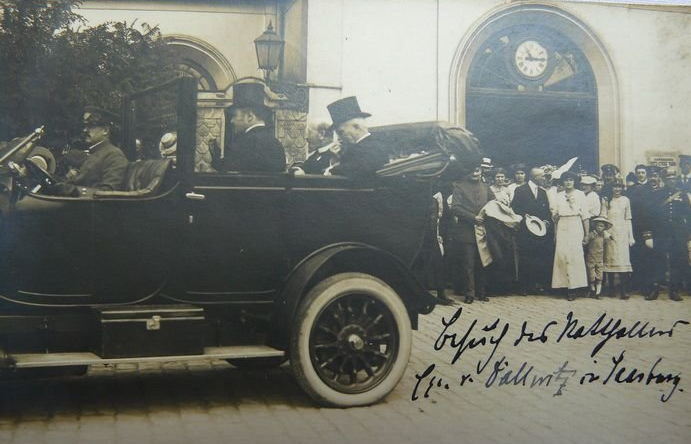 Ministerpräsident von Anhalt, Innenminister des Königreichs Preußens, Kaiserlicher Statthalter im Reichsland Elsaß-Lothringen